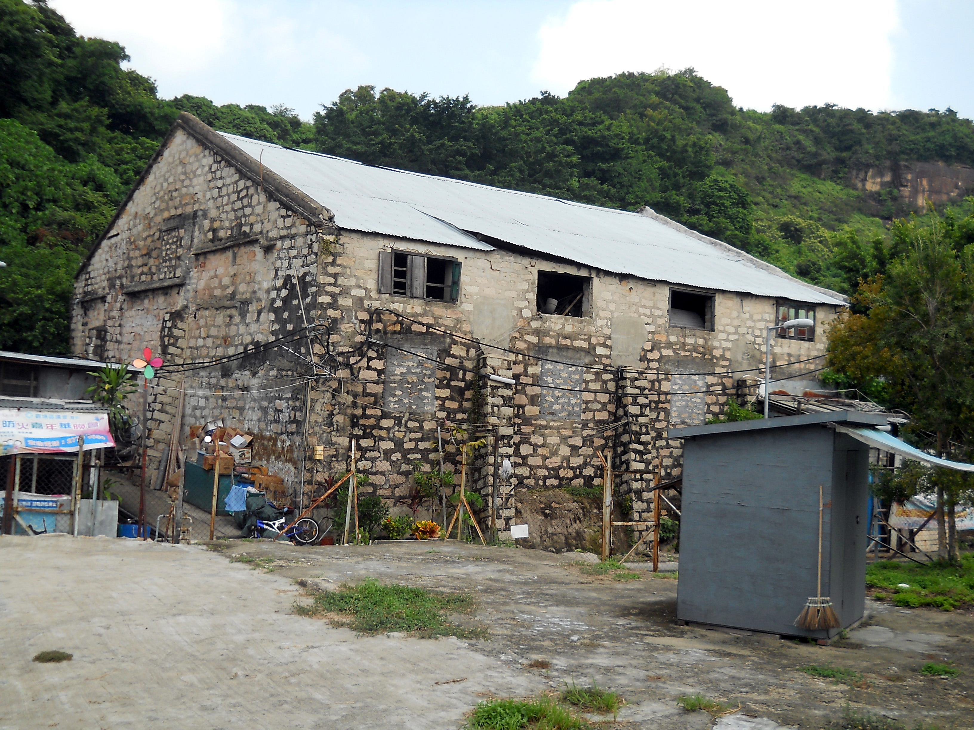 中文（香港）: 茶果嶺羅氏大屋